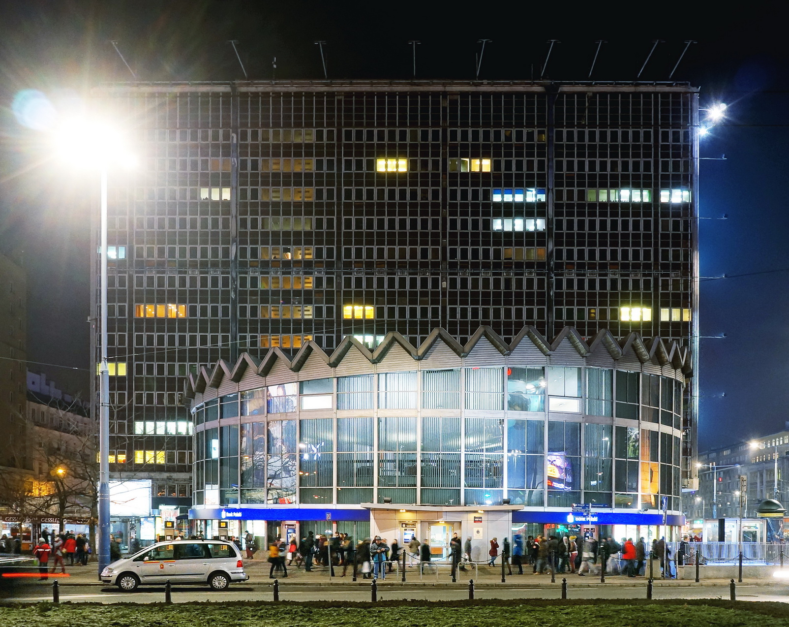 Rotunda i Uniwersal w Warszawie, styczeń 2014, wkrótce obydwa budynki mają być zburzone i zastąpione nowszymi